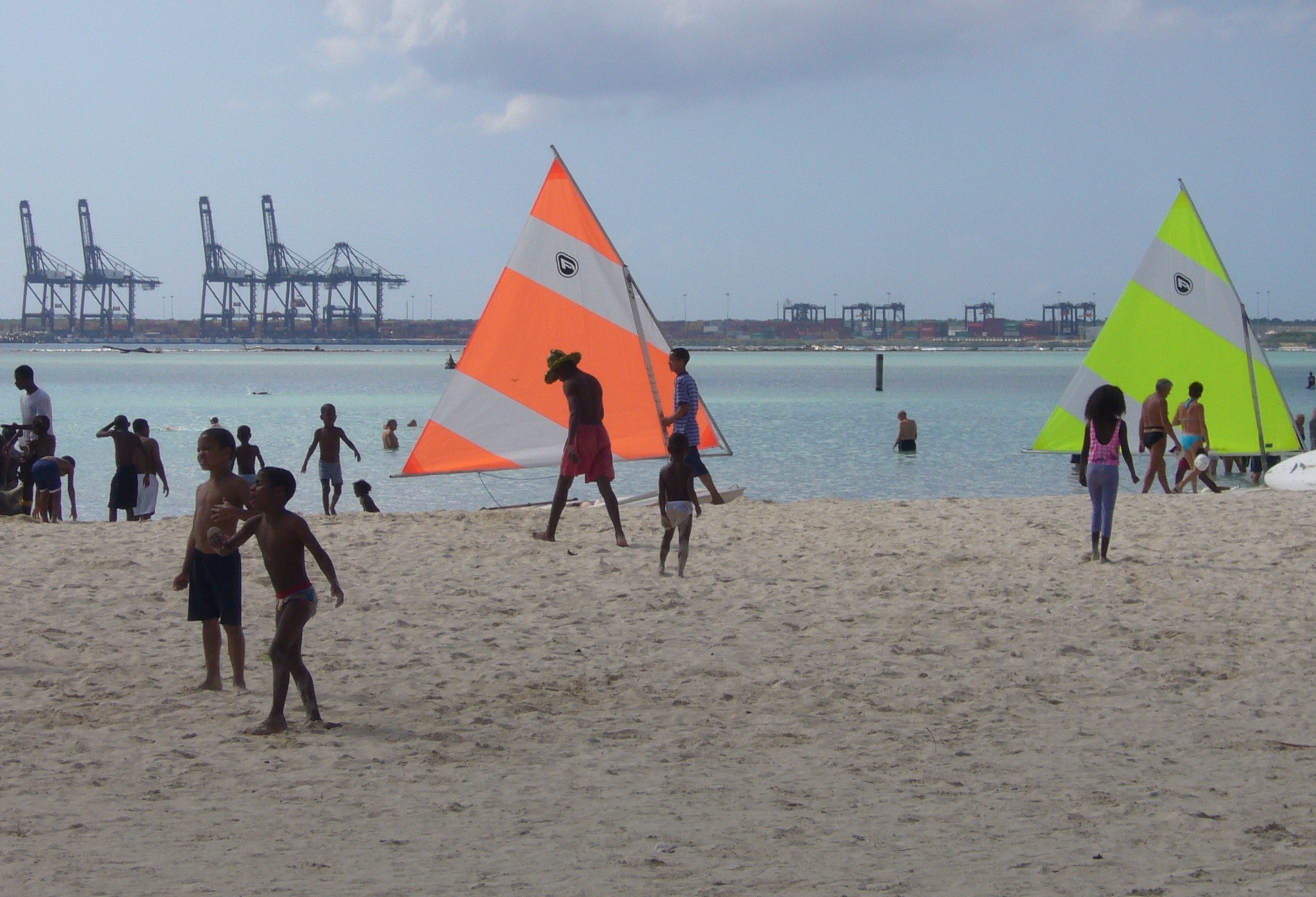 In Sichtweite vom Sandstrand liegt der Hafen